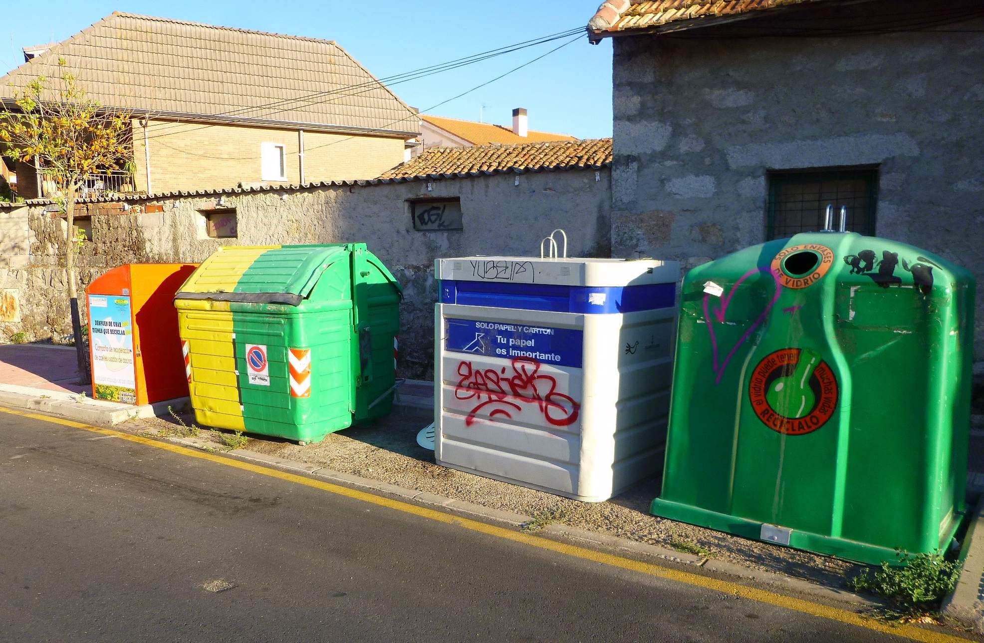 Collado Villalba - reciclado de residuos urbanos